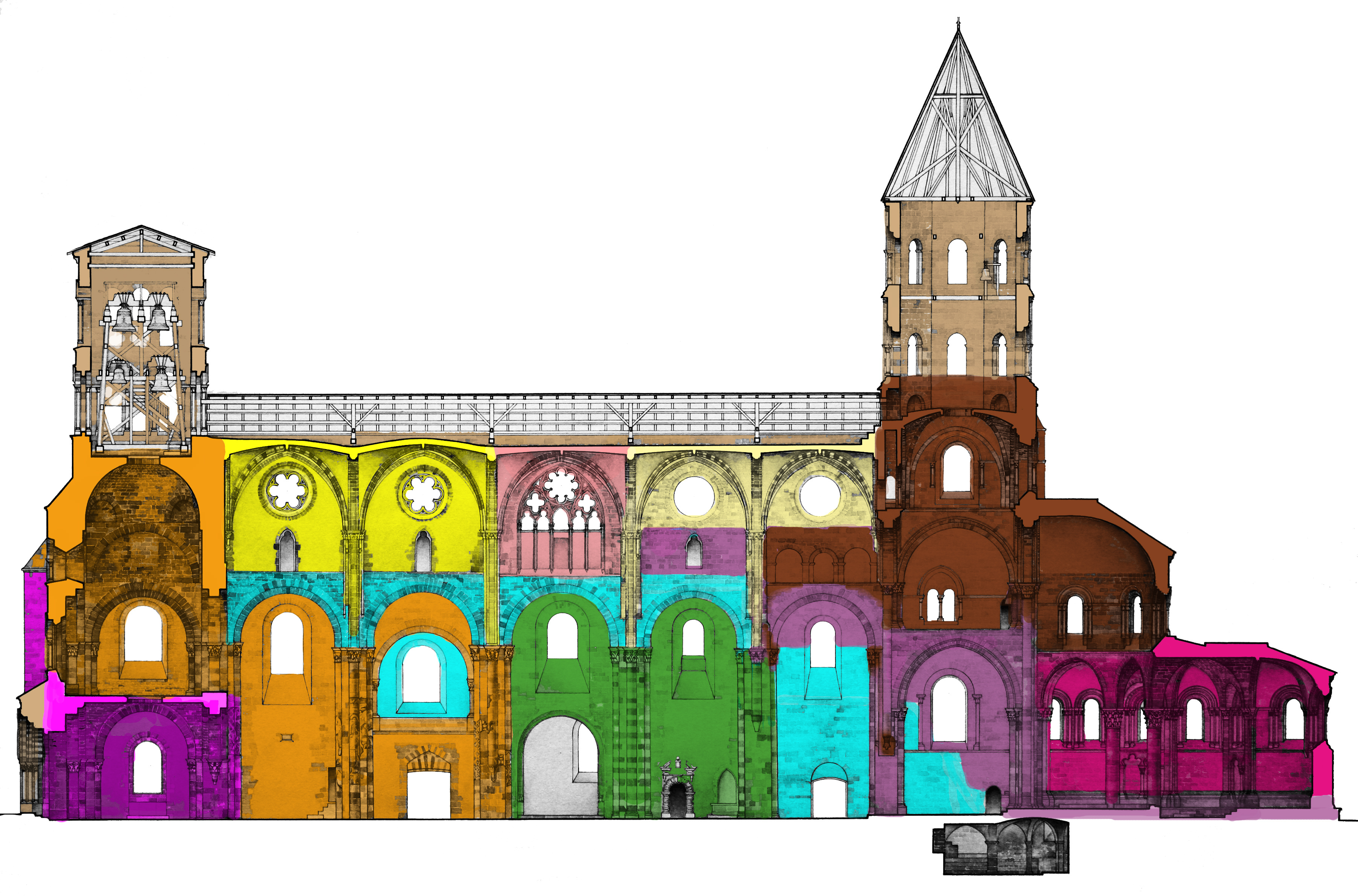 Chronologie du chantier - Fabien VIvier(légende attachée au plan de dessous)